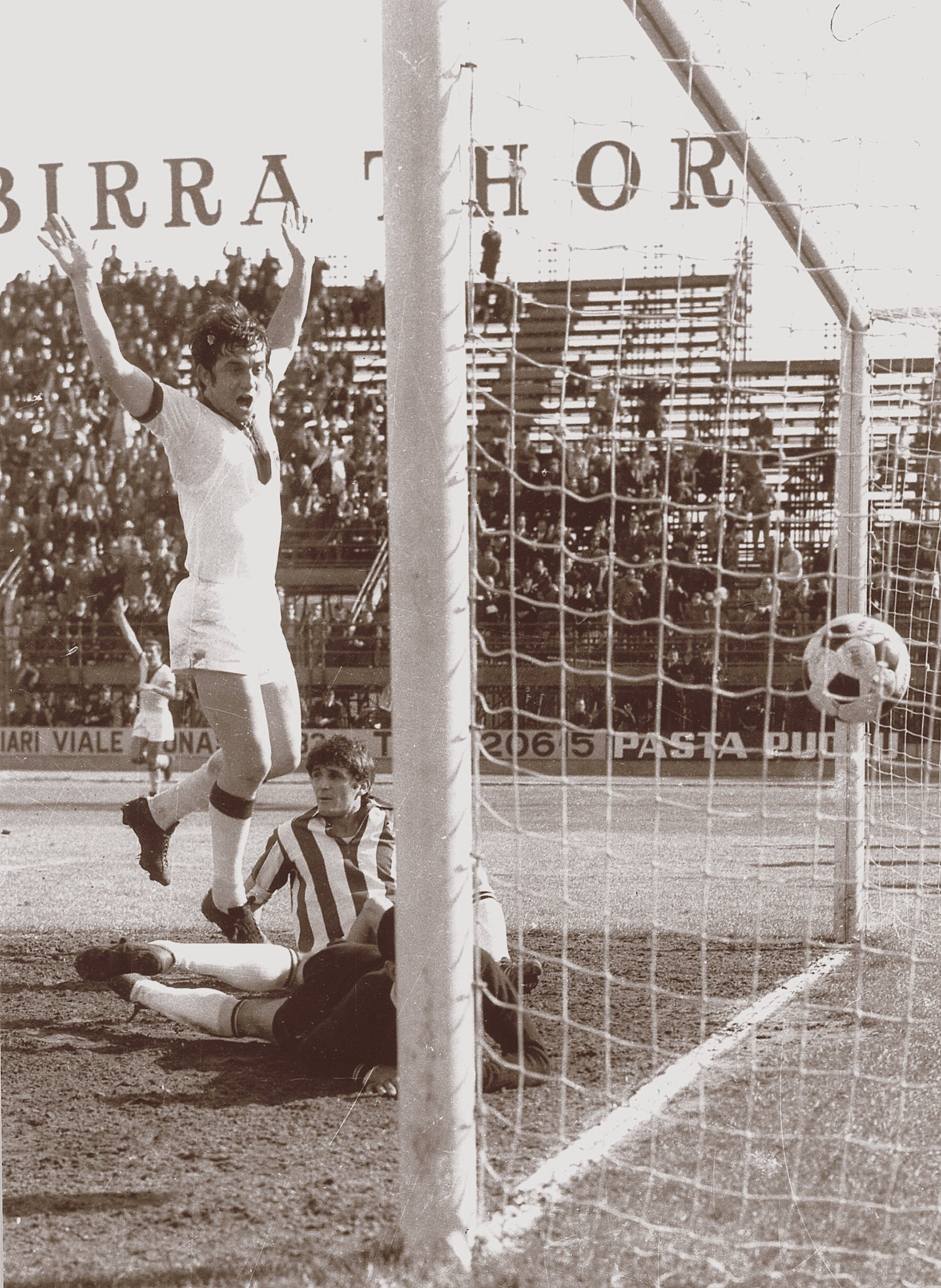 Il calciatore italiano Roberto Boninsegna in gol per il Cagliari nella seconda metà degli anni 60 del XX secolo.